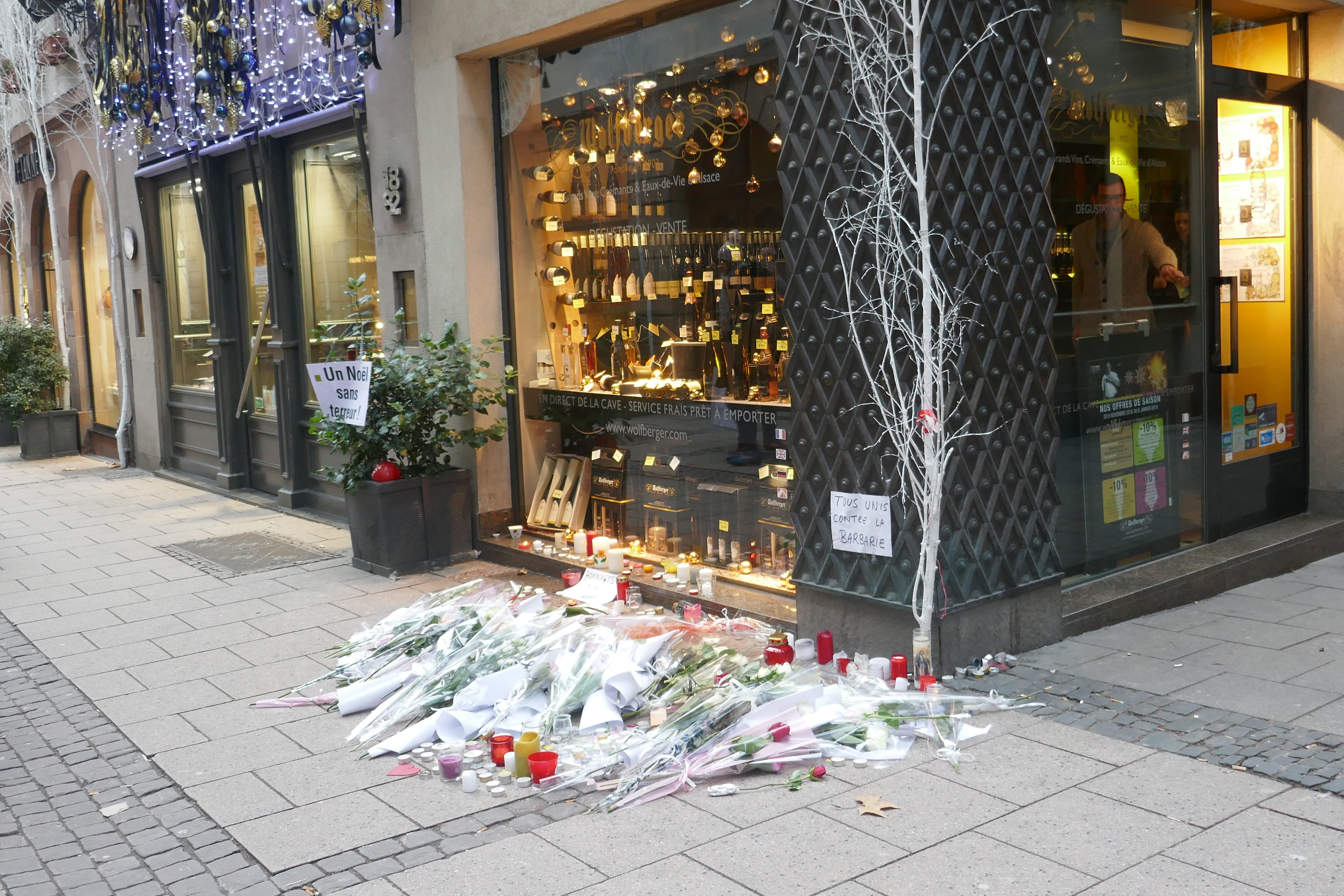 Fusillade de Strasbourg 2018 : hommages dans la rue des Orfèvres,le surlendemain.